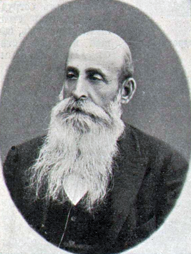 Вейнберг, Пётр Исаевич